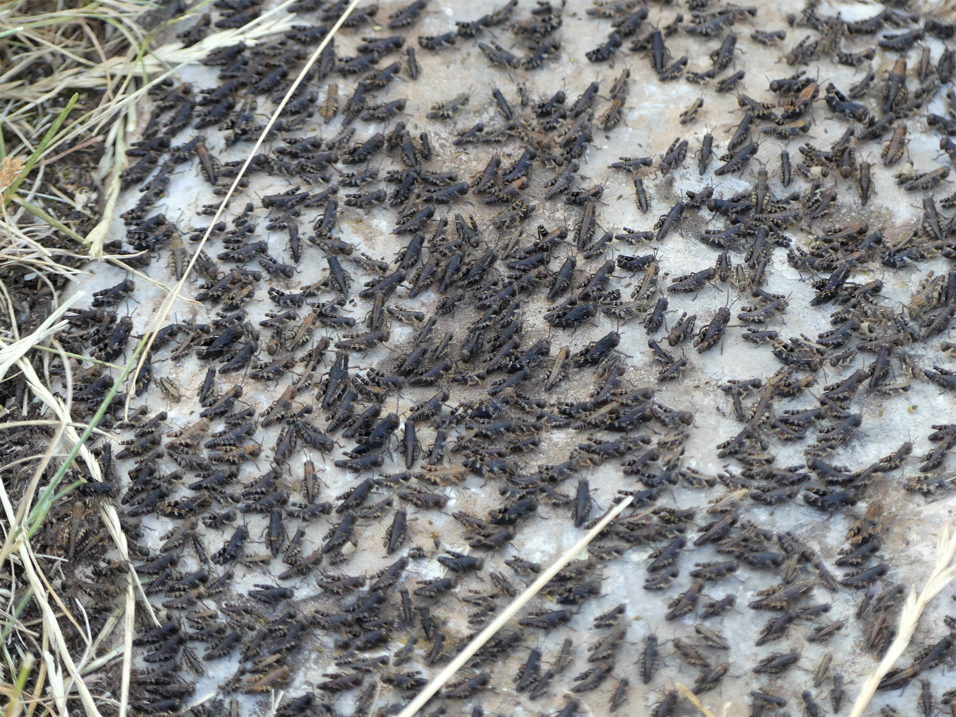 Invasion de criquets italiens (Calliptamus italicus) à Saint-Martin-du-Larzac, Millau, Aveyron, France.